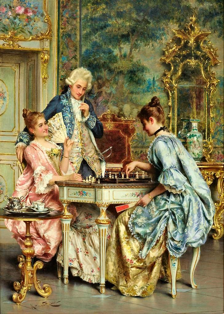 Arturo Ricci (1854-1919). Игра в шахматы х.,м. Частное собрание